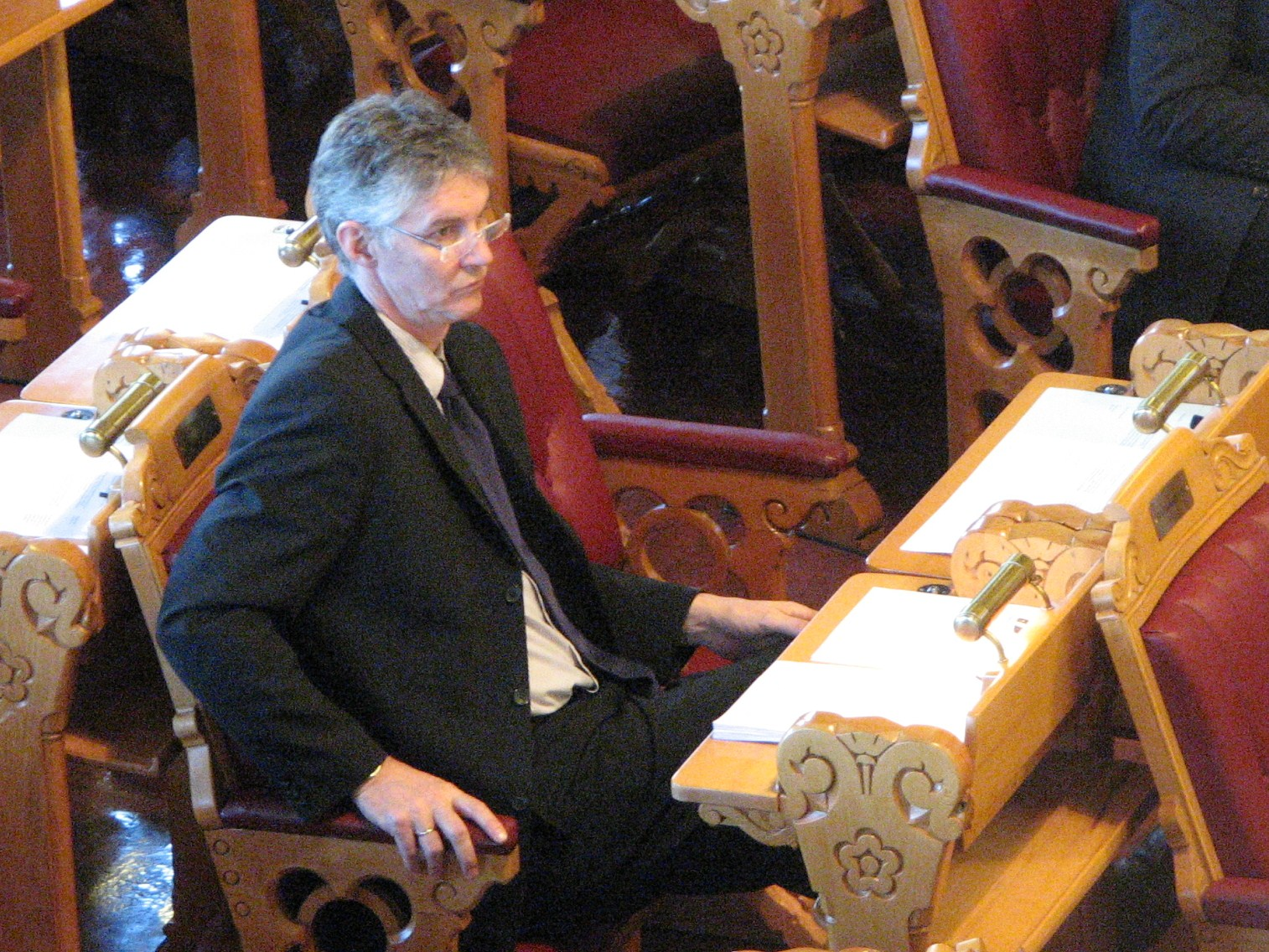 Vidar Bjørnstad (Ap) i Stortinget 12. februar 2009. Beskjært fra et større bilde.